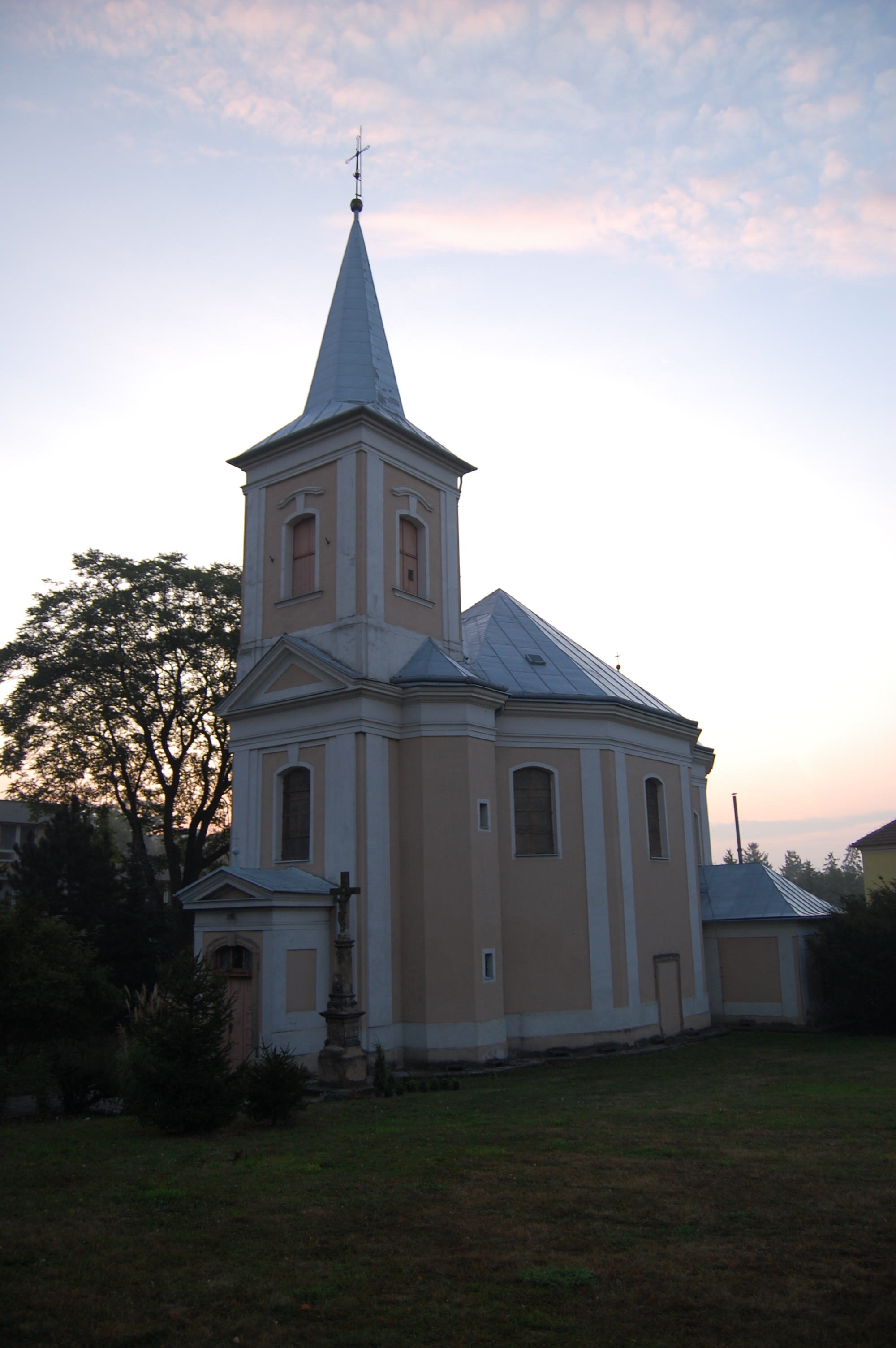 Kostel Panny Marie Pomocnice - čelní pohled, ulice I.P.Pavlova, Olomouc